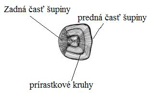 Predstavuje schematický nákres šupiny kapra.